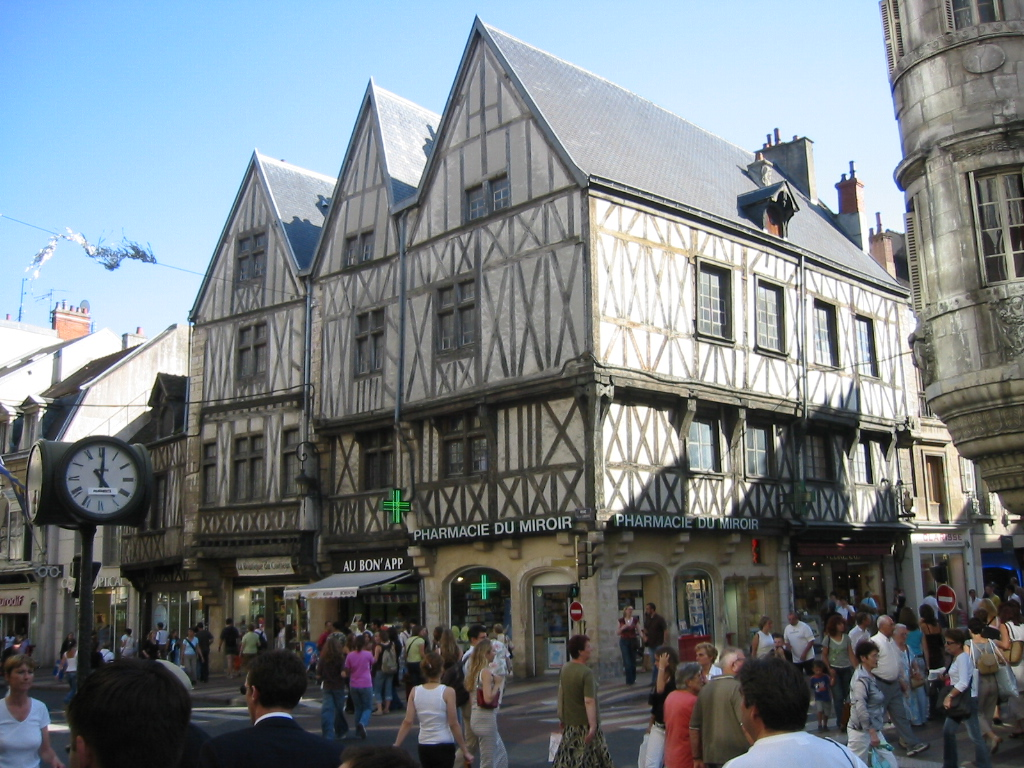 Place du Miroir sur la rue de la liberté à Dijon